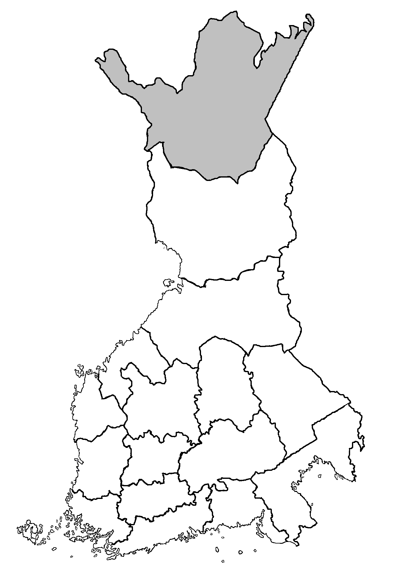 Lapin vaalipiiri vuoteen 1938 asti